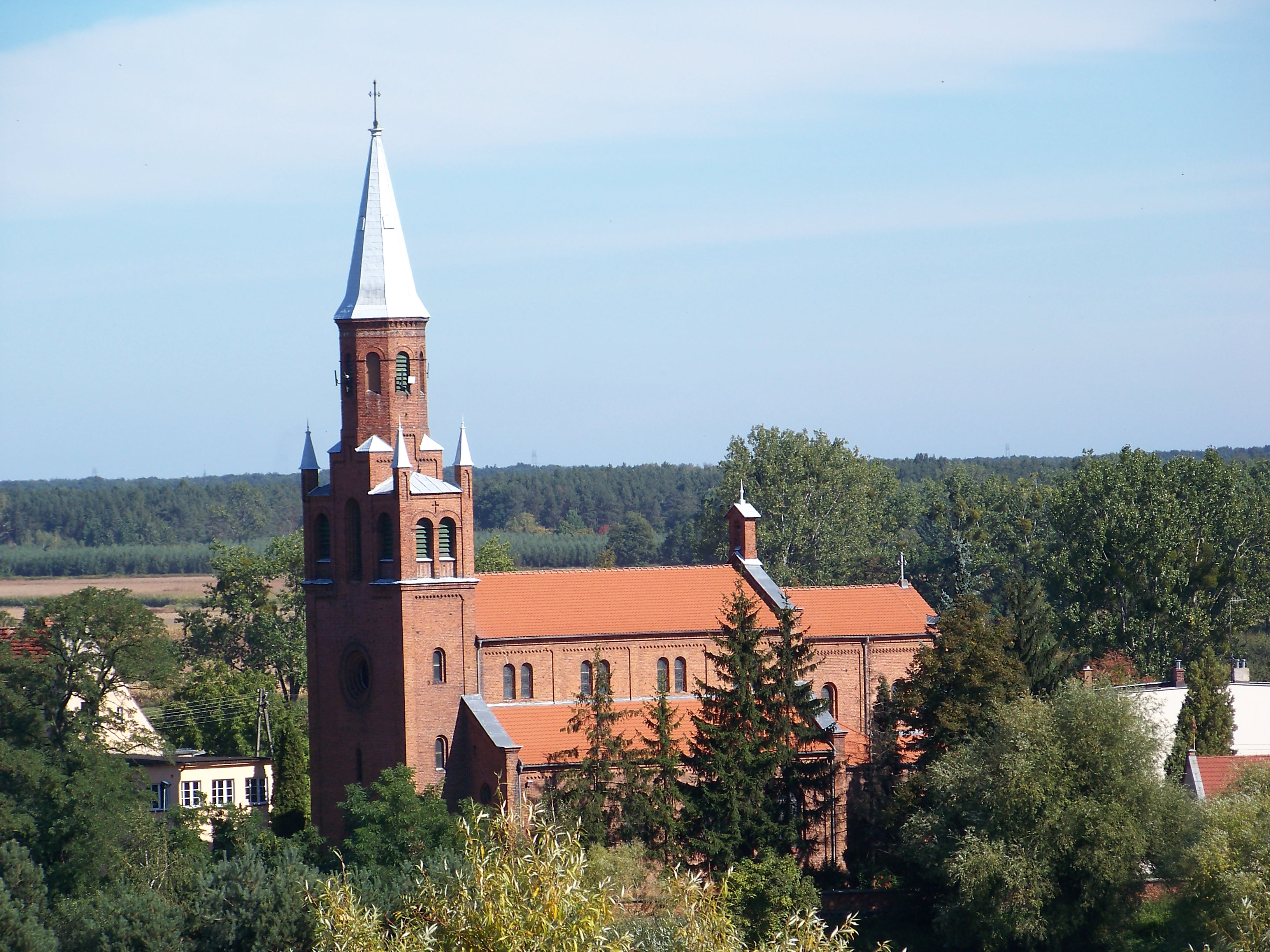 Skorogoszcz - kościół parafialny p.w. św. Jakuba (zabytek nr 1072/66 z 20.01.1966)